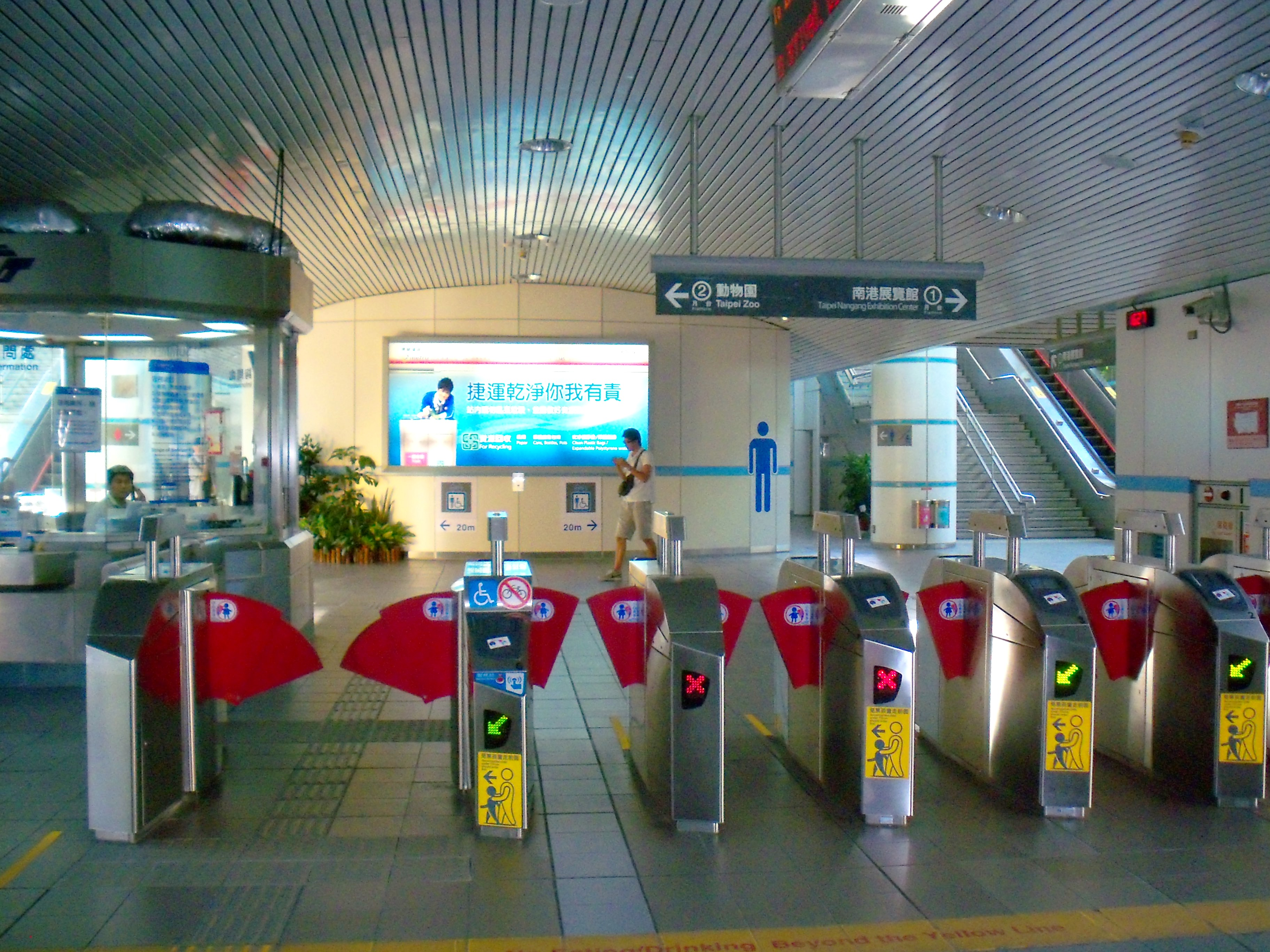 台北捷運文山線木柵駅一階改札口とコンコース。